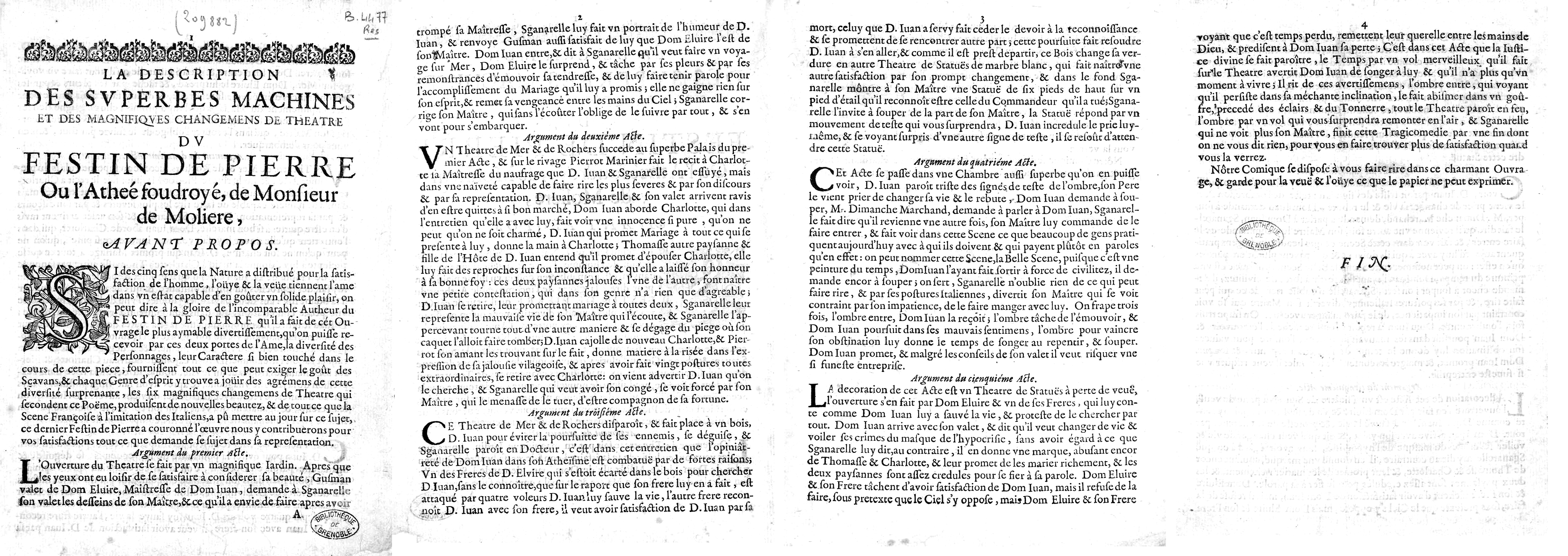 Programme-annonce du Festin de pierre donné en province